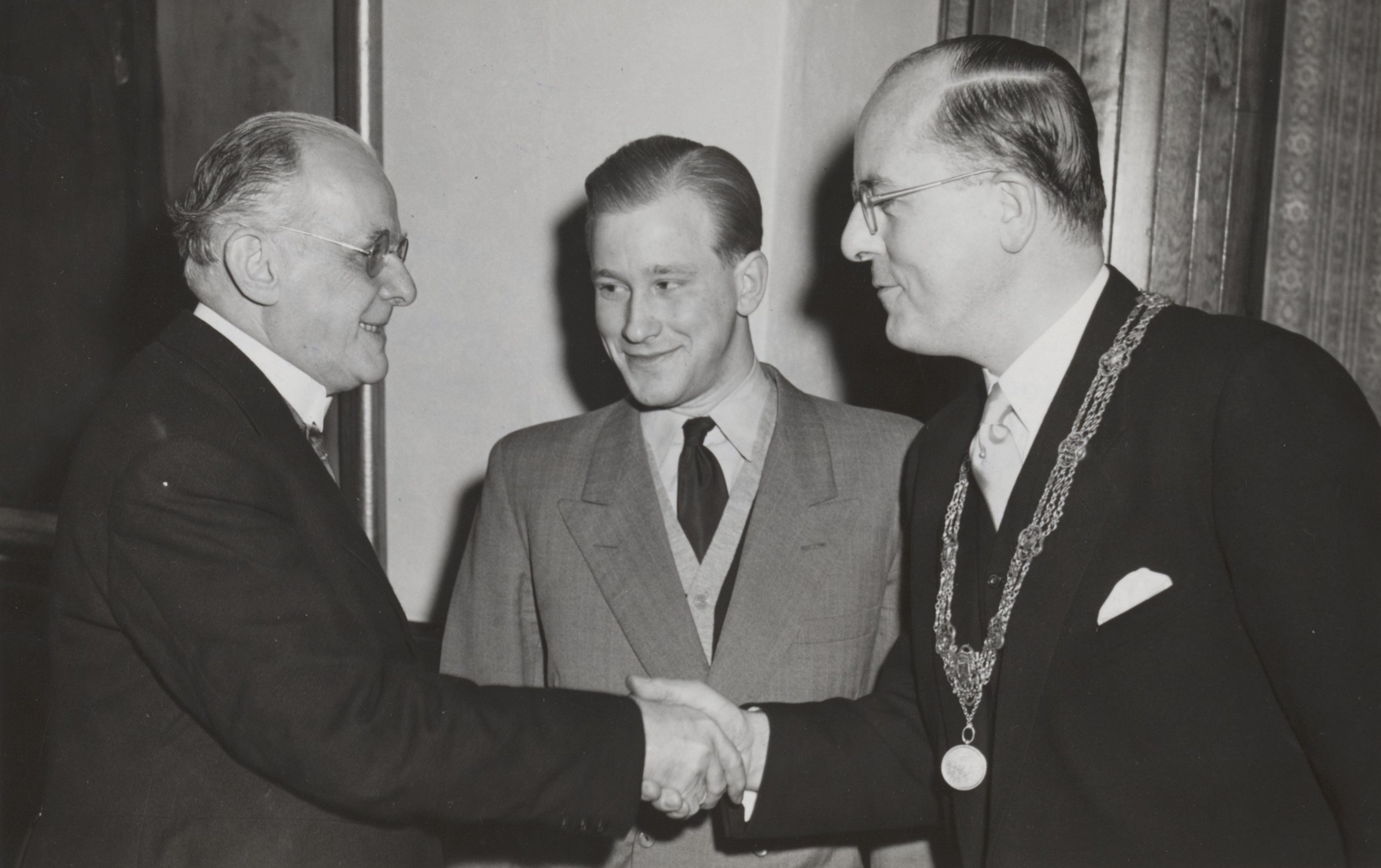 Constantijn Huygensprijs 1950 en Jan Campertprijs 1949 uitgereikt. Van links naar rechts: Geerten Gosseaert (Carel Gerretson), Michel van der Plas en burgemeester Frans Schokking. Datum 12 december 1950